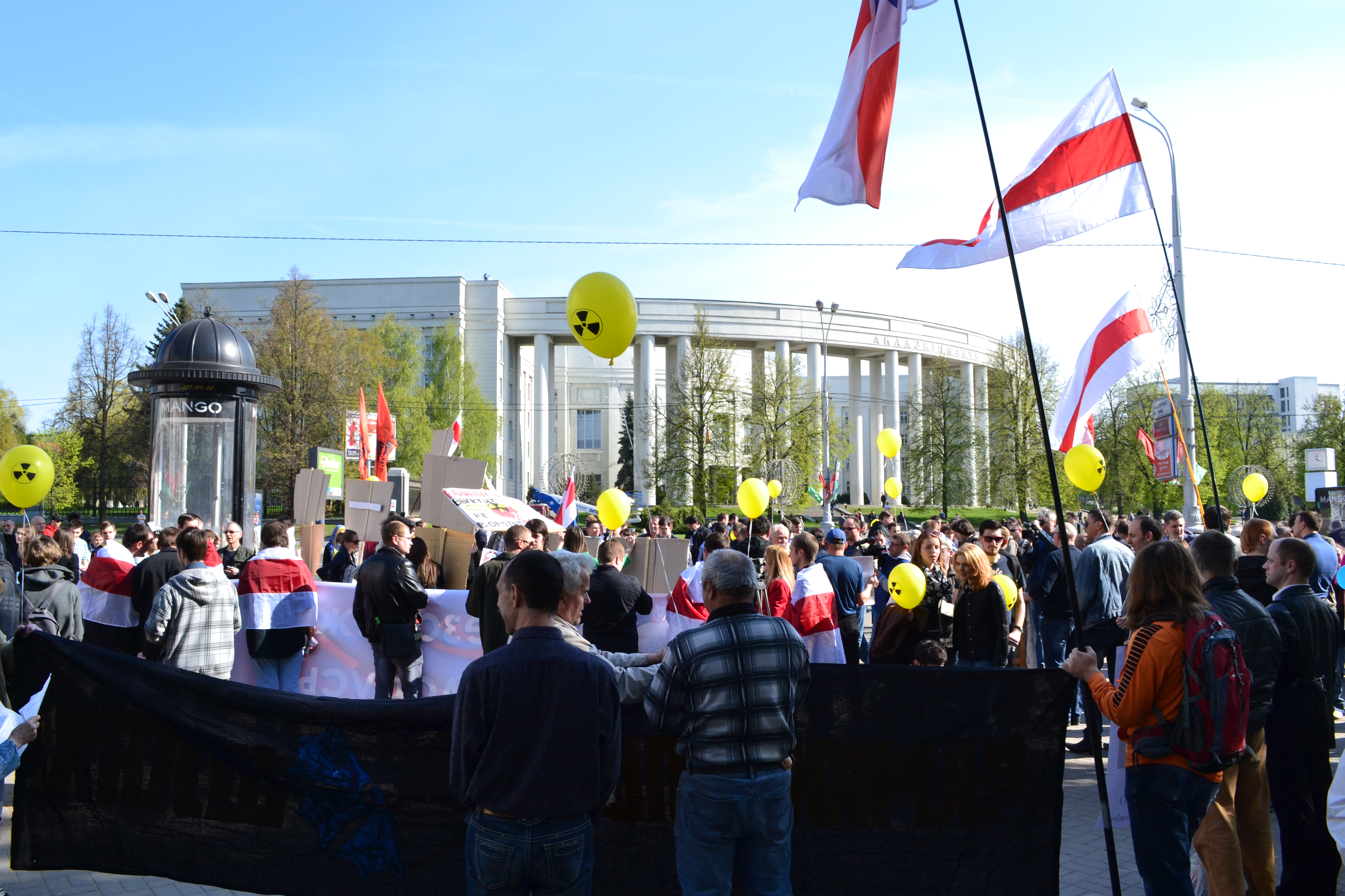 Беларуская (тарашкевіца): Чарнобыльскі шлях